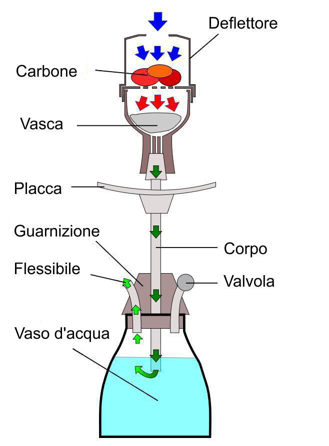 Narghilè tradotto in italiano